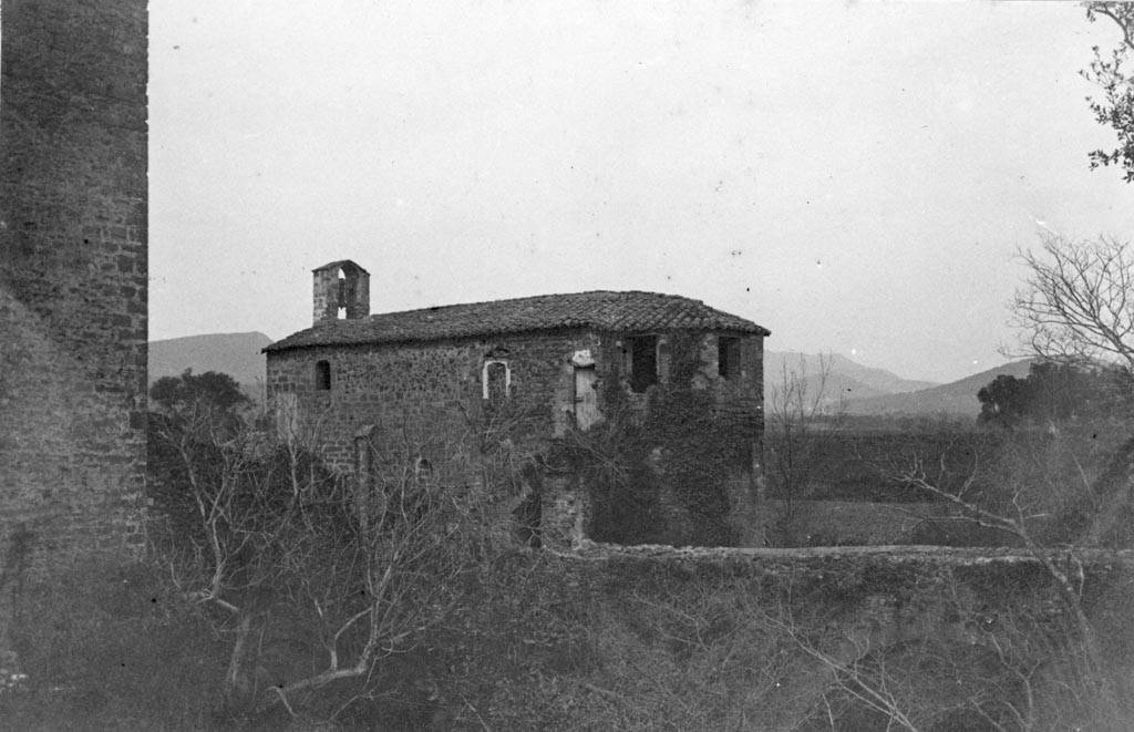 Església de Santa Esperança al Castell de Cartellà. Juli Vintró i Casallachs (Entre 1890 i 1911)